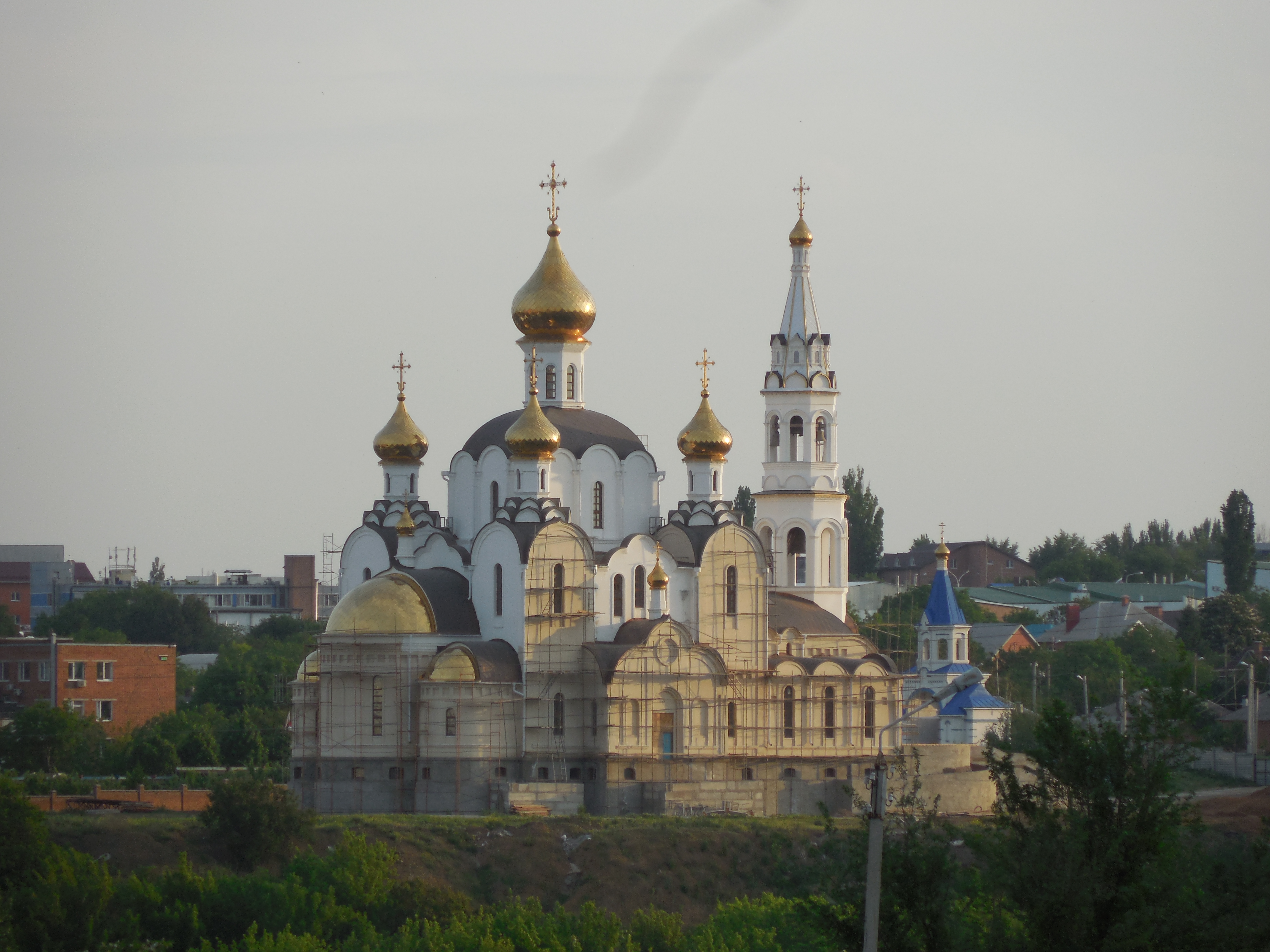 Свято-Троицкий пятипрестольный собор на территория Иверского женского монастыря: улица Неклиновская, 3 (Северный жилой монастырь), Ростов-на-Дону, Ростовская область